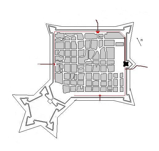 Mappa di Torino nel 1858